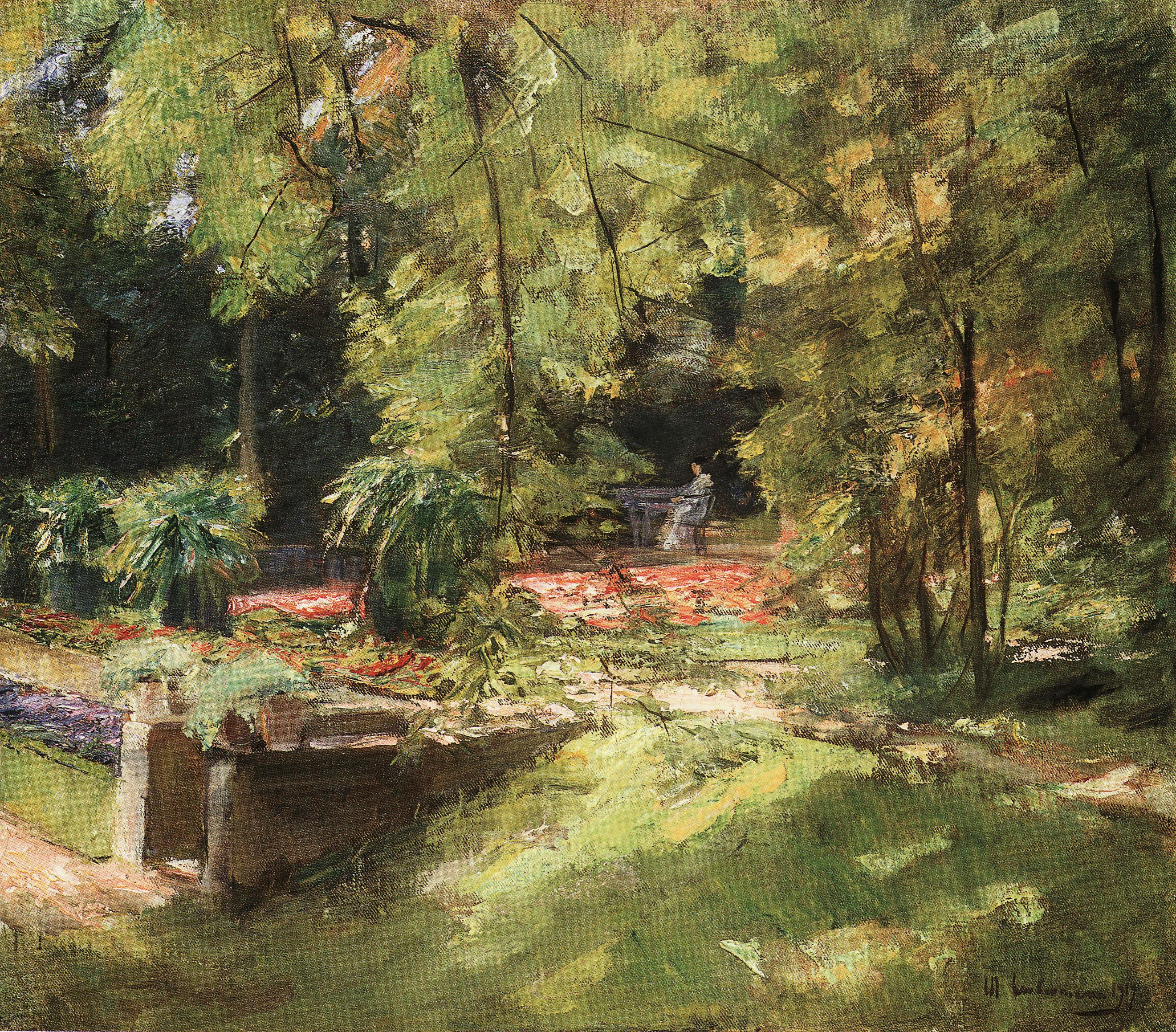 „Die Blumenterassen im Wannseegarten nach Südwesten“ - entstanden im Garten der Villa Liebermann am Wannsee